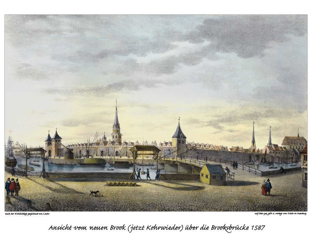 Aussicht vom Kehrwieder über die Brooksbrücke auf die Stadt Hamburg. Das Bild stellt den Stand um 1587 dar.